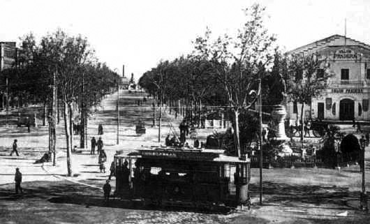 Plaza Zorrilla de Valladolid a principios del siglo XX